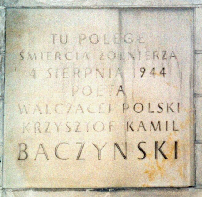 tablica znajdująca się na ścianie pałacu Blanka przy pl. Teatralnym w Warszawie (fot Zu)